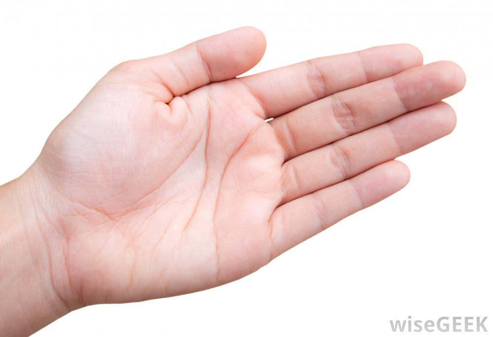 ձախ ձեռք